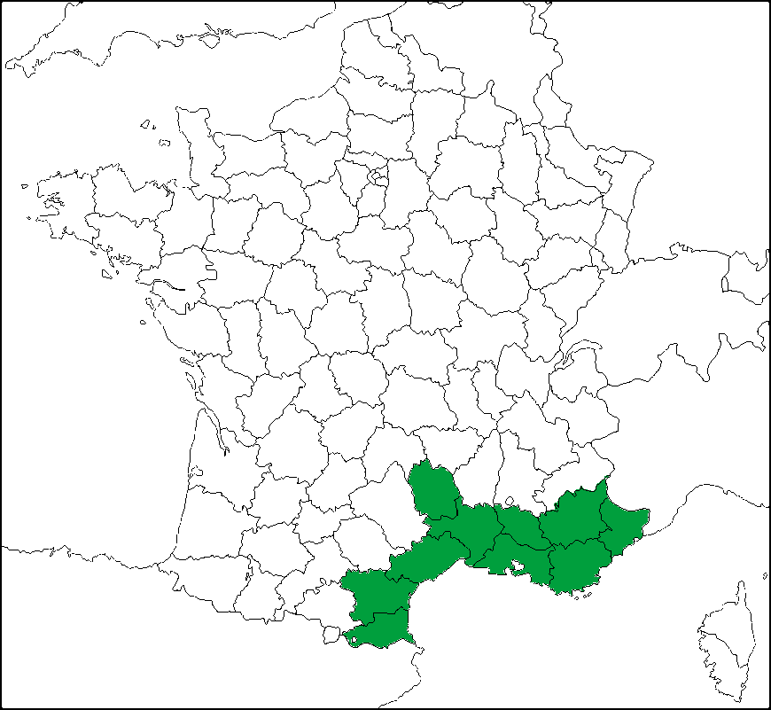 Carte de France des départements avec en vert la zone Provence Côte d’Azur, Languedoc-Roussillon